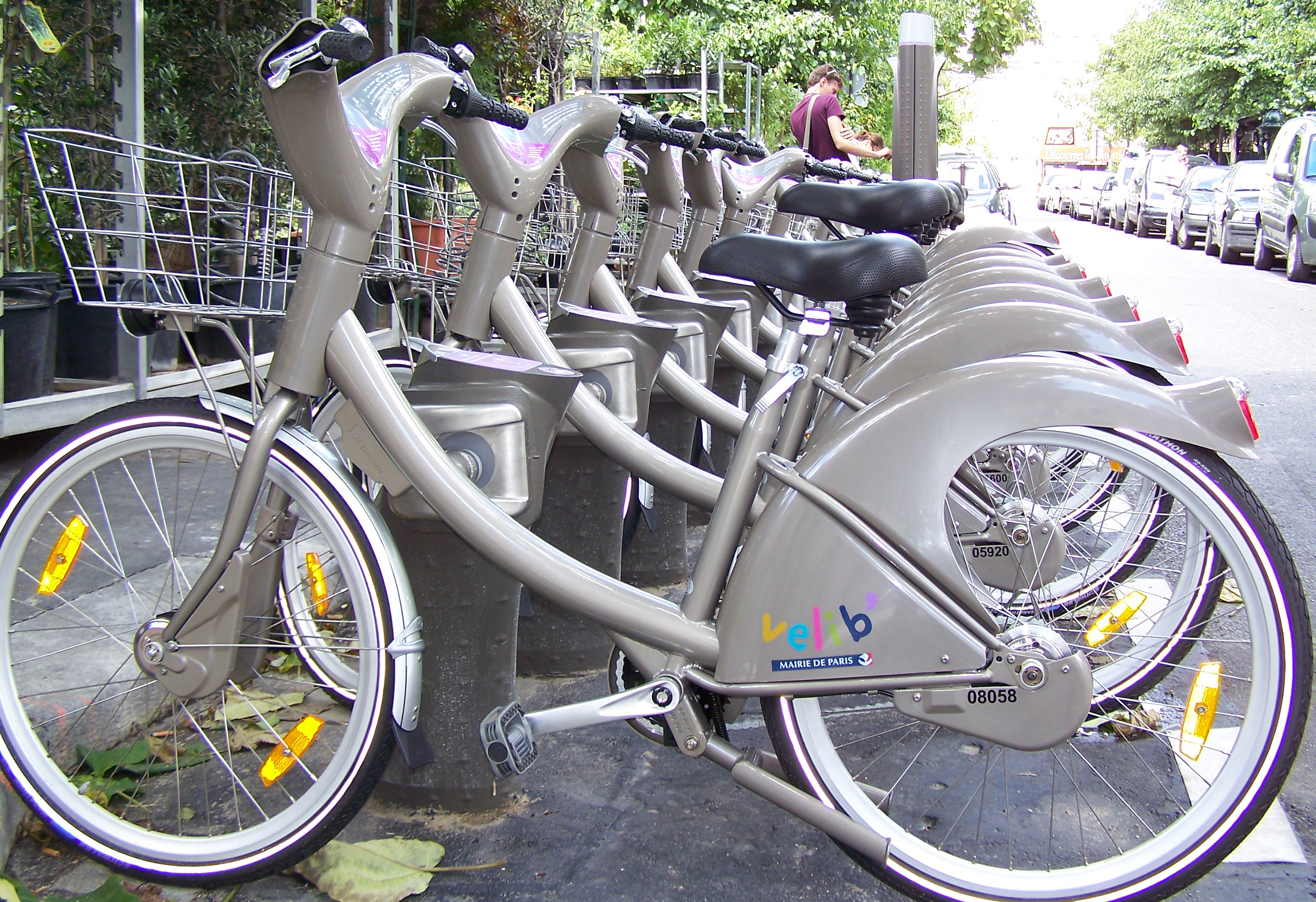 Velib bycicles in Paris near metro Cité (Station n° 4002 place Louis Lépine)